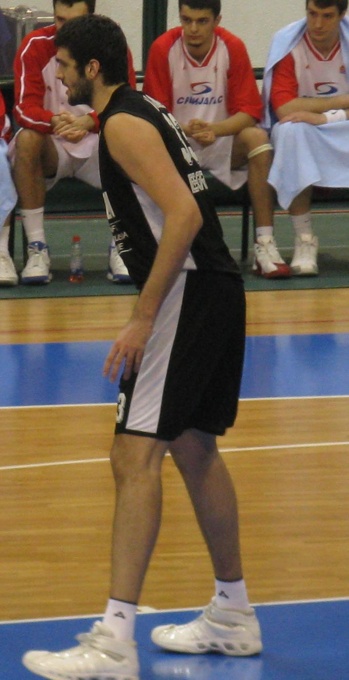 Slavko Vraneš